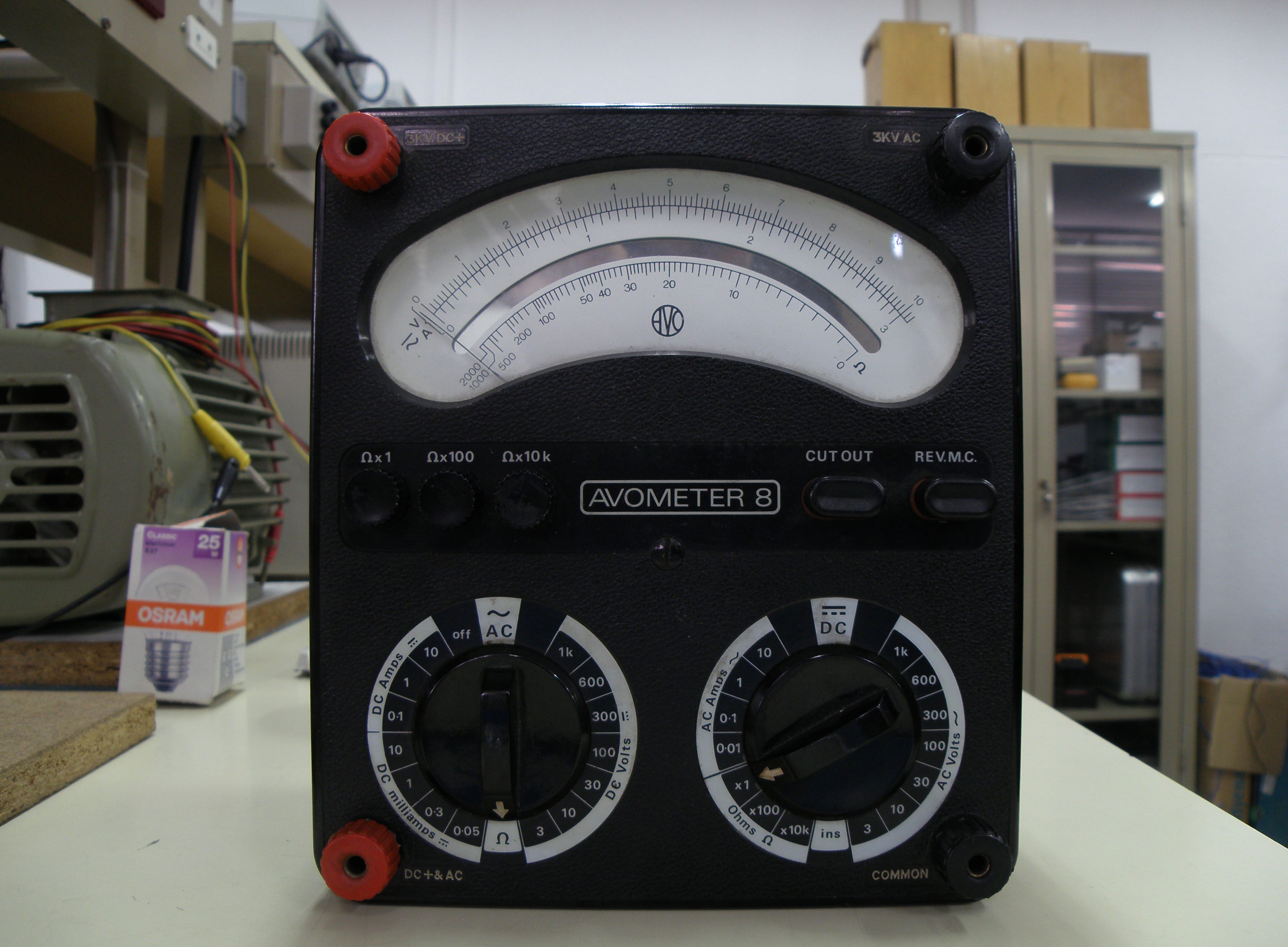 Imagen de un Avometro modelo 8 adquirido por la ETSIT-UPM en 1978.